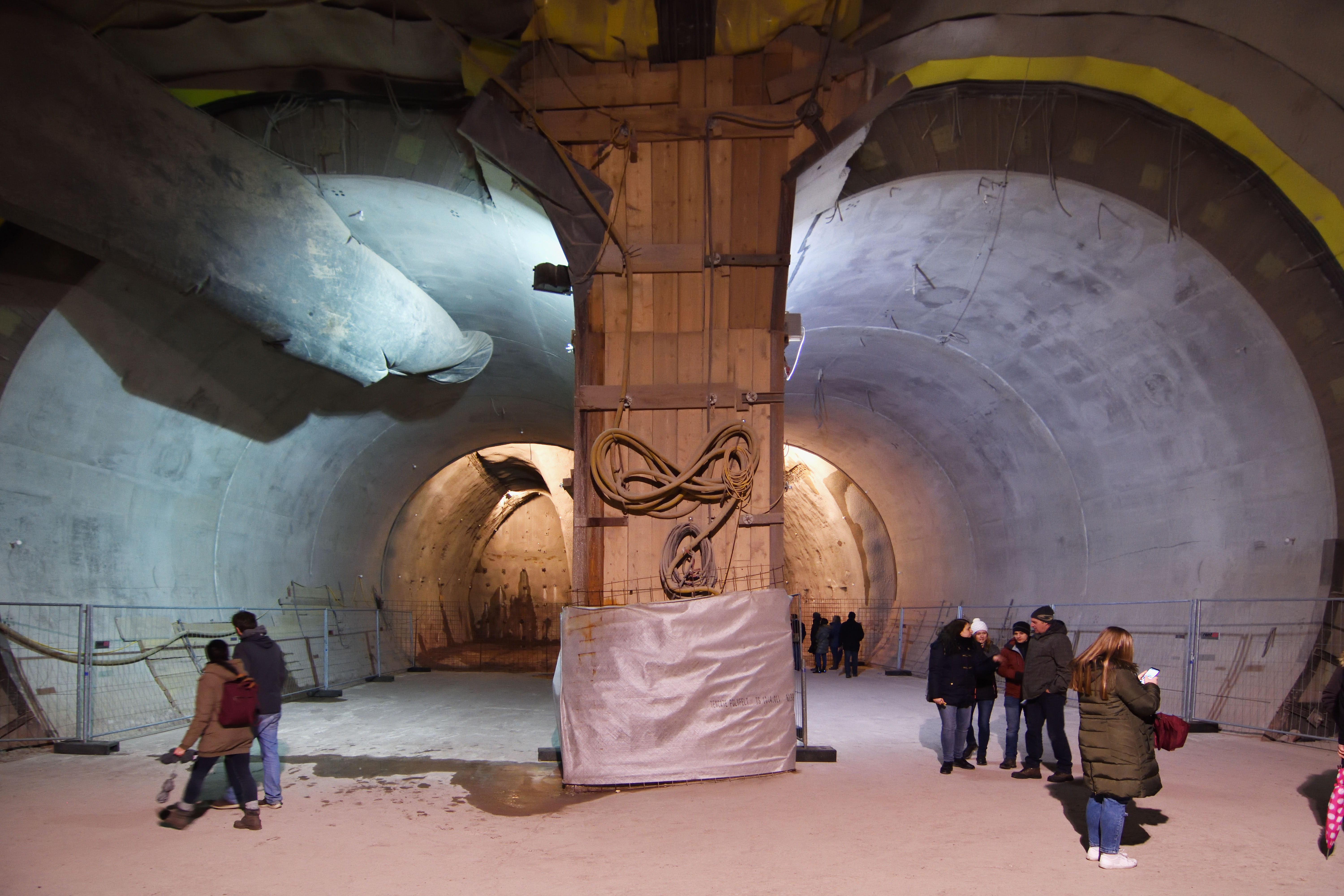 Südkopf des neuen Stuttgarter Hauptbahnhofs. Blick von der Rettungszufahrt Süd in im Bau befindliche Tunnel Richtung Hauptbahnhof.